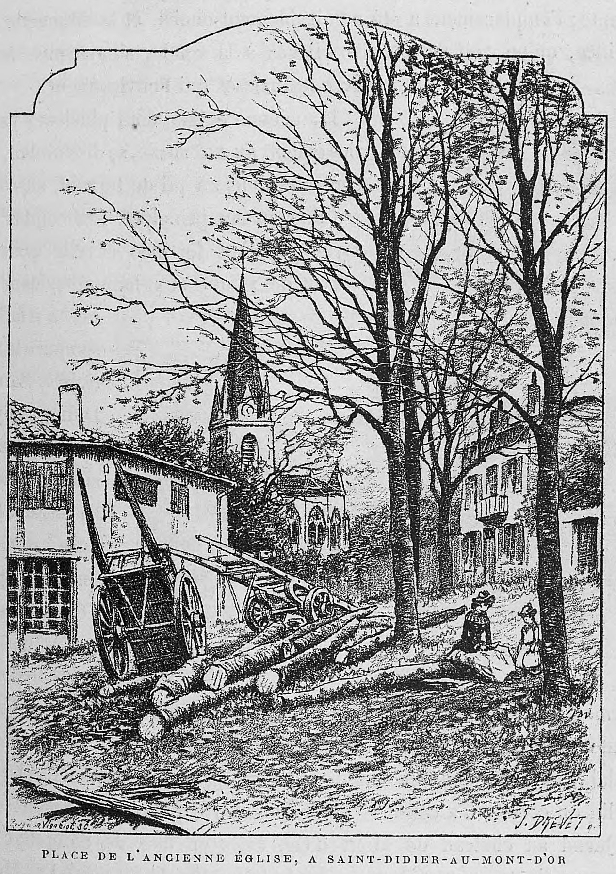 Aux environs de Lyon / Monsieur Josse ; préface de M. Coste-Labaume ; édition illustrée de 250 dessins de J. Drevet.